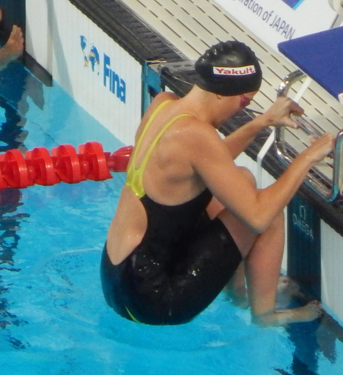 Кирсти Ковентри в Казани на дистанции 50 метров на спине (полуфинал)